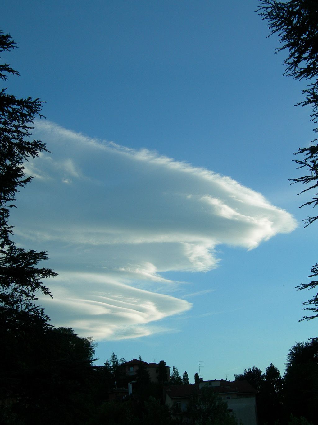 Nube lenticolare sopra Torino a maggio 2007.